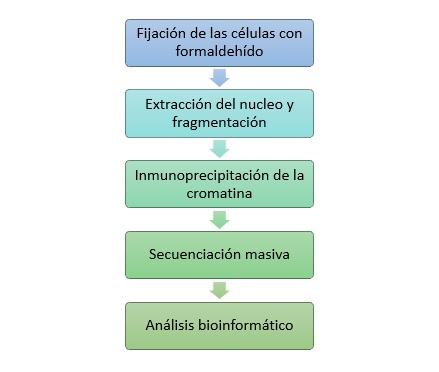 Este esquema representa los pasos básicos que comprenden el método de ChIP-seq.